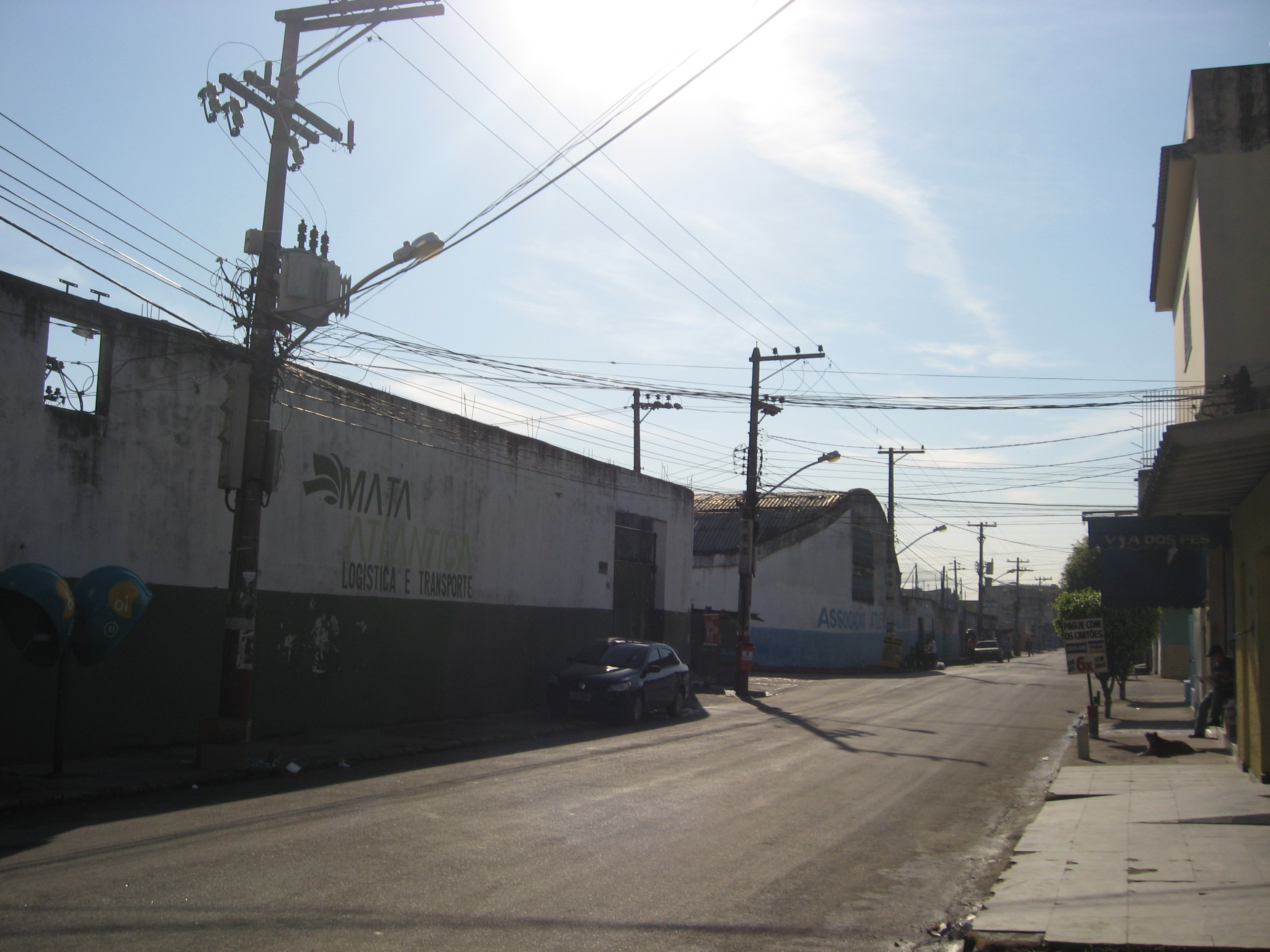 Bairro Presidente Juscelino, Mesquita, RJ, Brasil